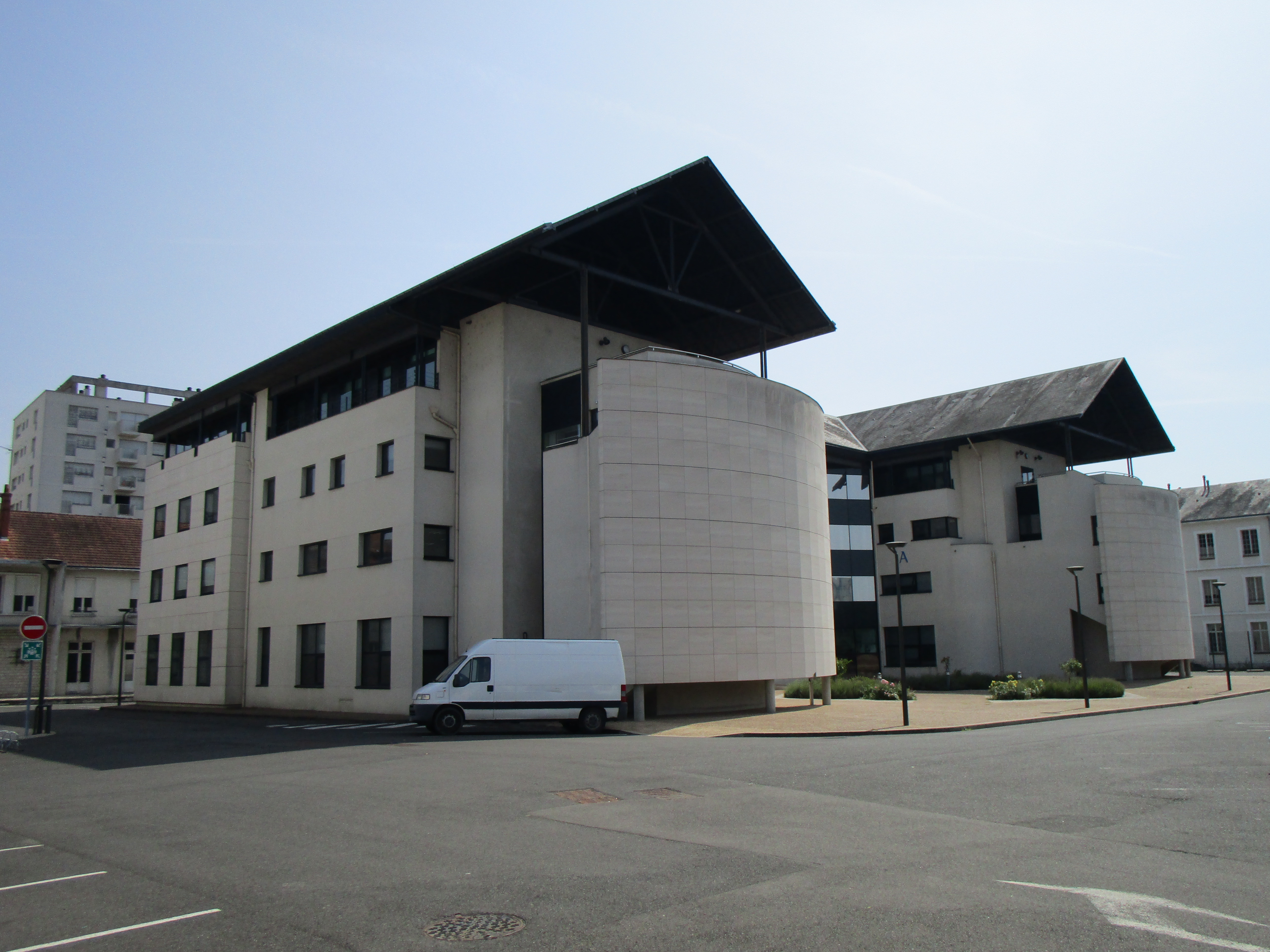 Le bâtiment A du campus du plat d'Étain, qui accueille les services centraux de l'Université de Tours, sur l'ancienne caserne militaire Beaumont, au nord du quartier Giraudeau